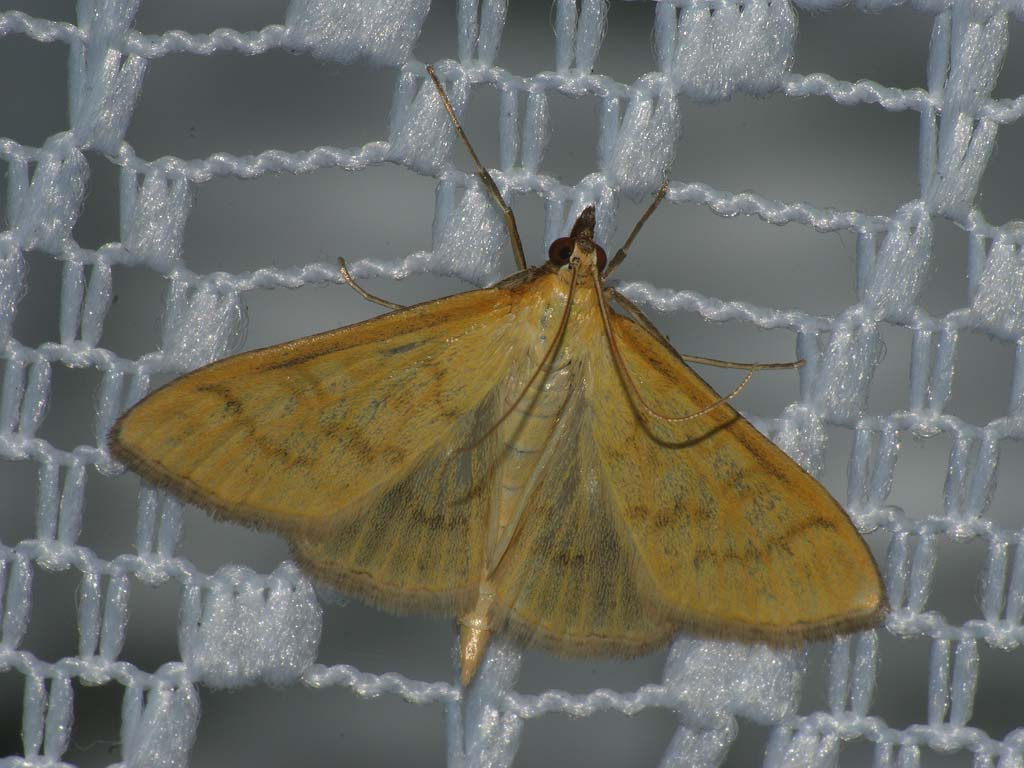 Exemplar found: Russia, Moscow Oblast, Odintsovsky District, near village Pestovo, 10.07.2011, by light МО, Одинцовский р-н, окрестности деревни Пестово, 10.07.2011, на свет